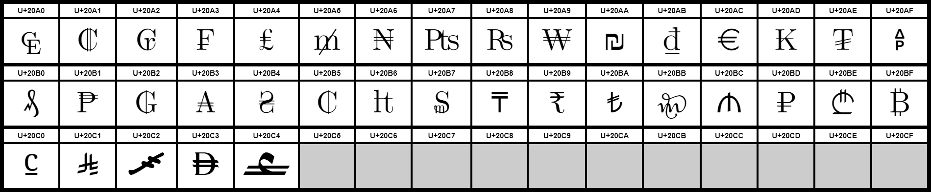 Grafiktafel für den Unicodeblock Währungszeichen. Schraffierte Felder sind unbesetzte Codepoints.